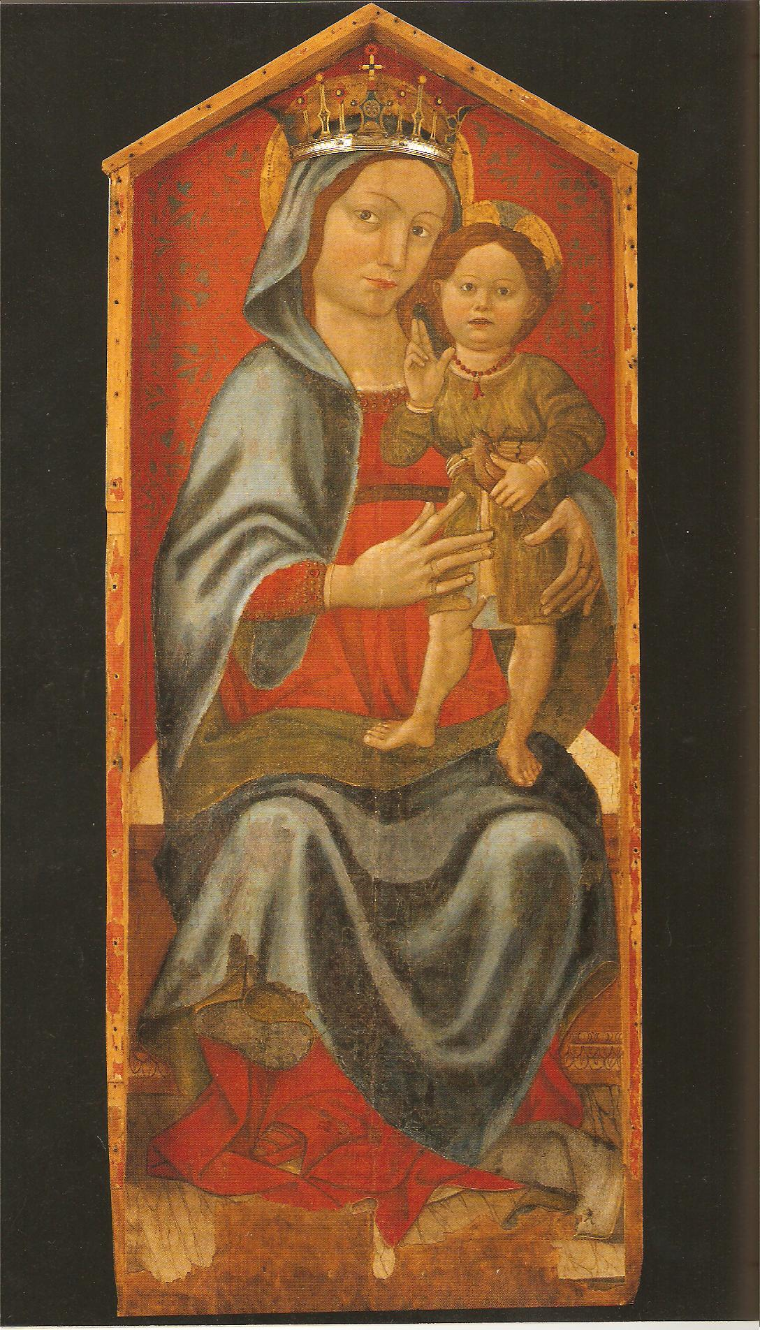 Splendida tavola della Vergine con Bambino di Andrea De Litio (1465 ca.), nella chiesa di S.Maria del Lago a Moscufo.